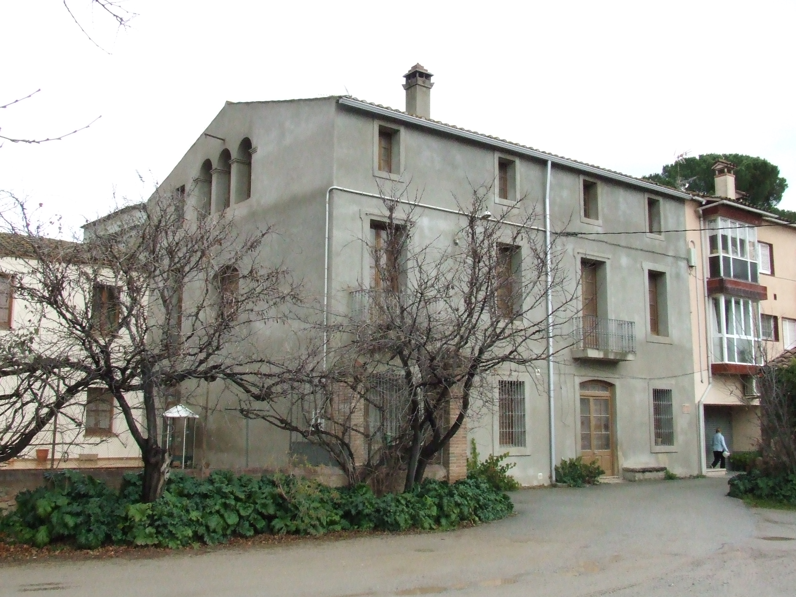 Can Sapera (Bigues, Bigues i Riells, Vallès Oriental)